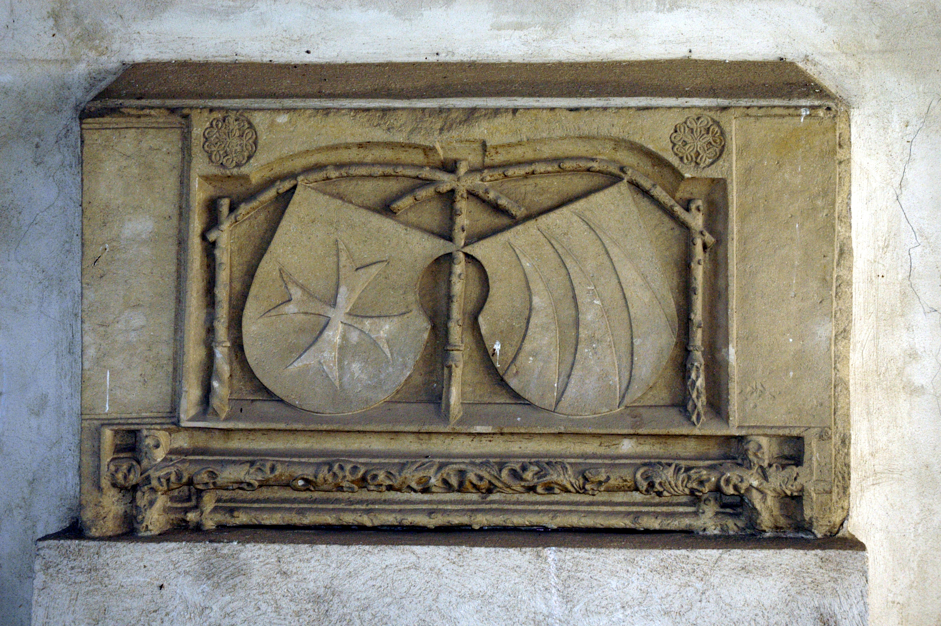 Schloss Mailberg, Allianzwappen von Karl Tettauer von Tettau in der Toreinfahrt